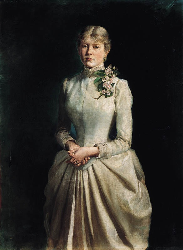 Portret żony artysty, Marii z Kisielnickich Kossakowej (1864-1943)